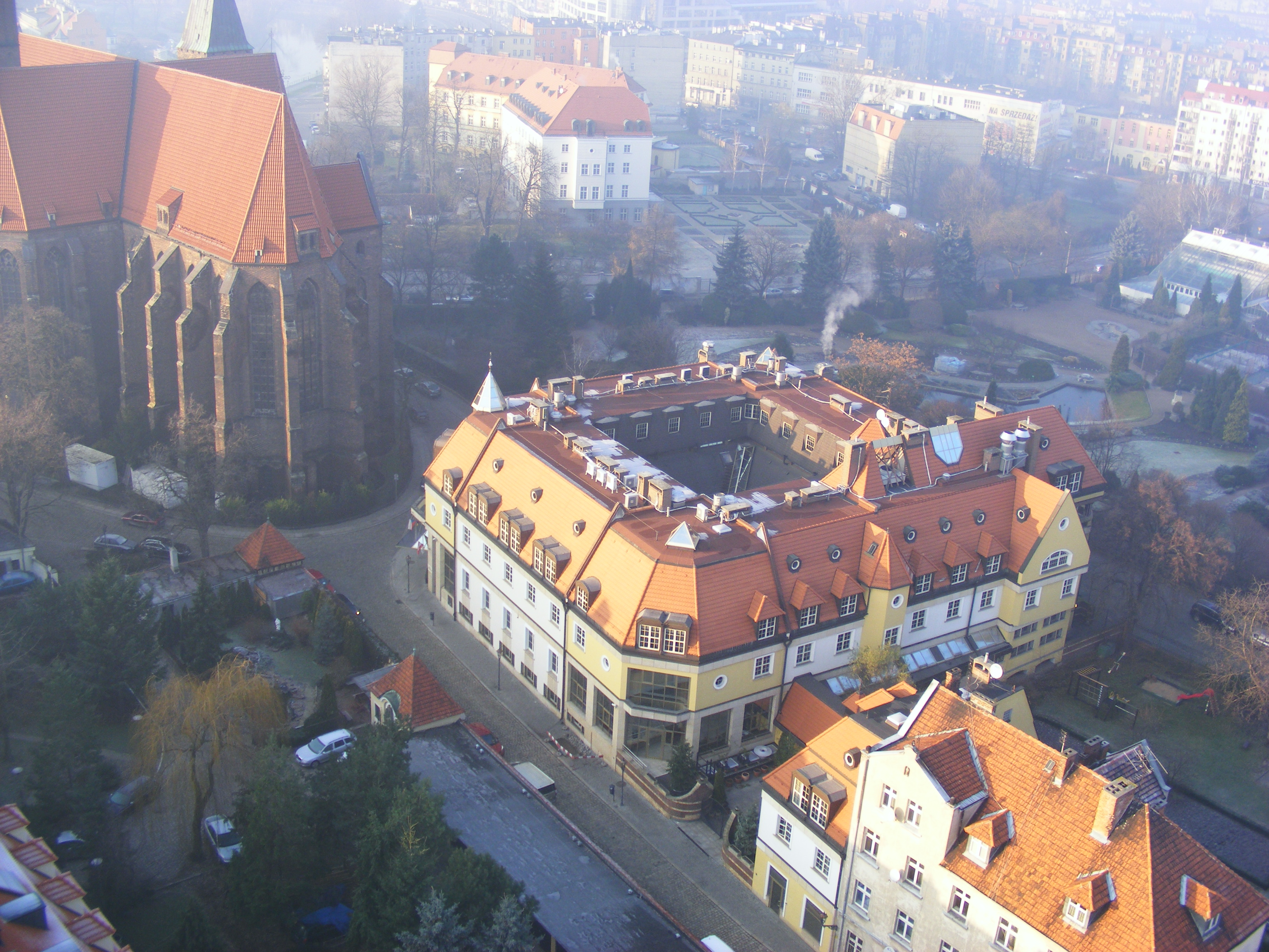 Wrocław w grudniu 2013.